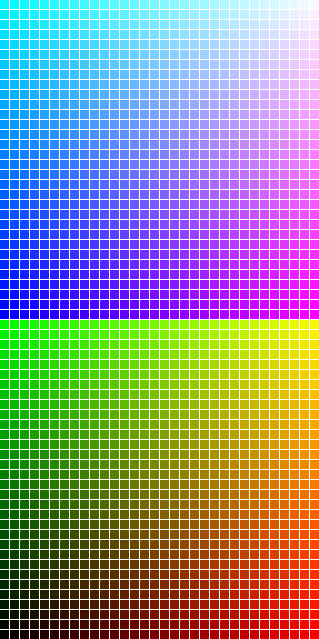 Color palette